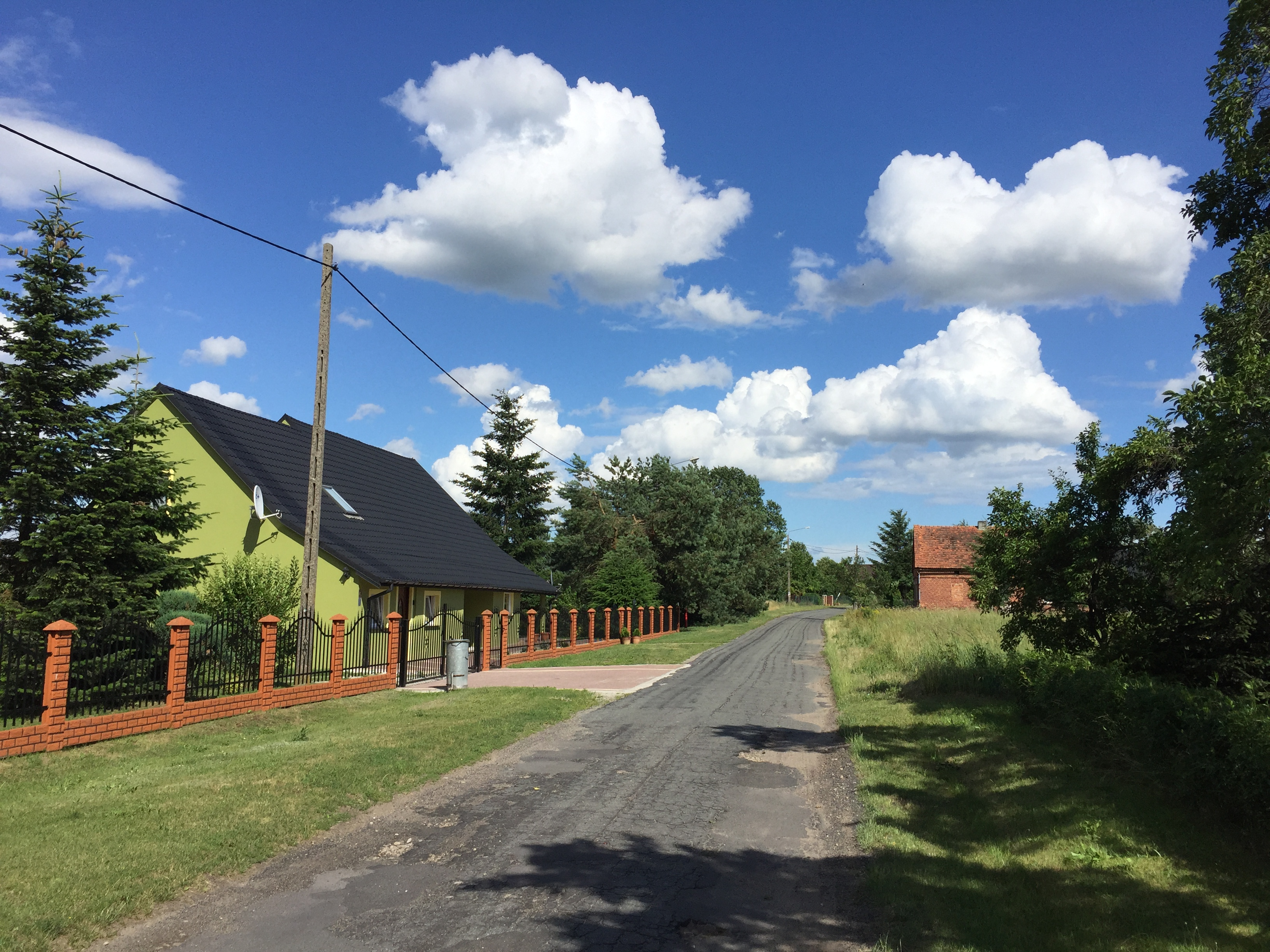 Droga w Radzieszynie